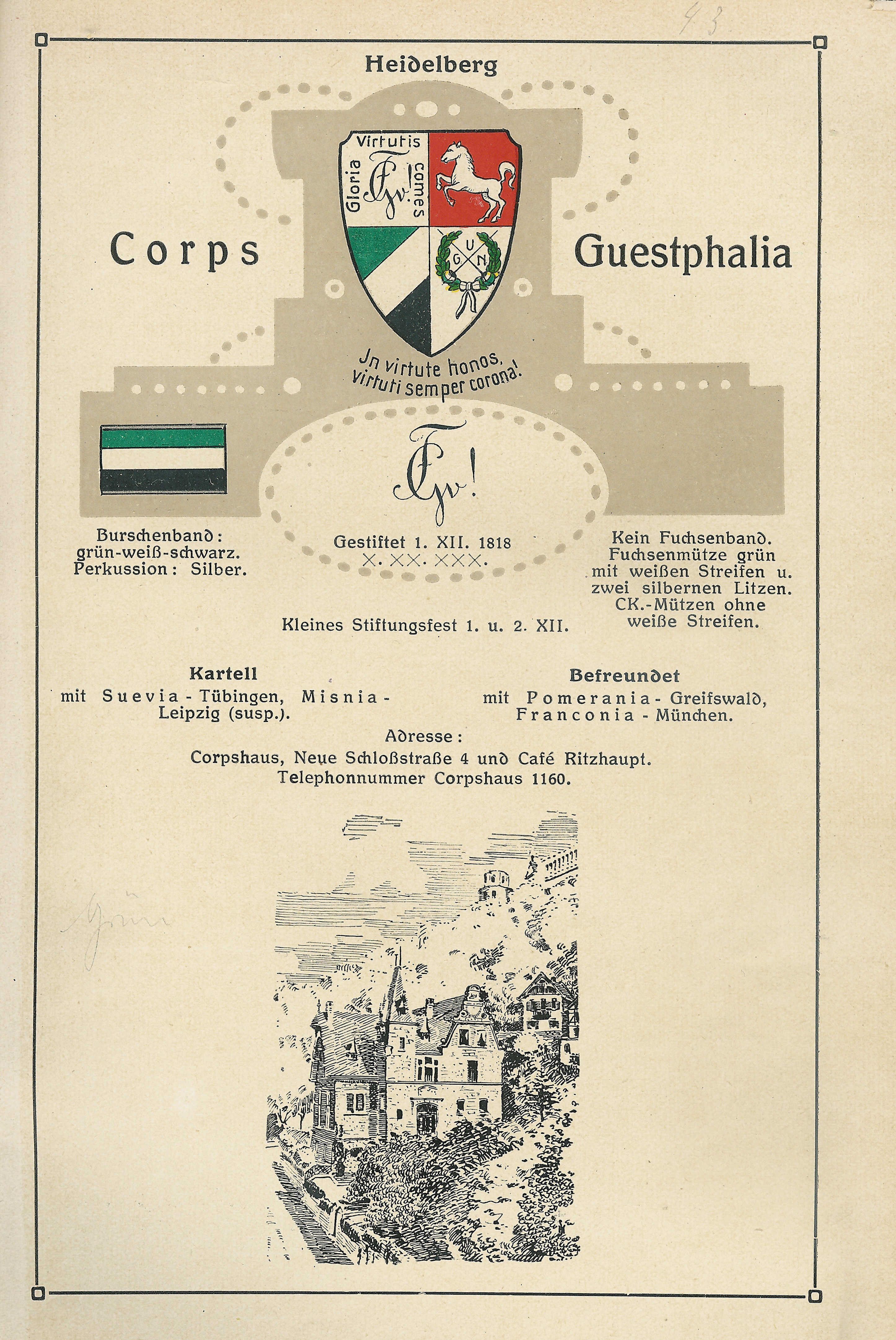 Wappen, Farben und Corpshaus von Guestphalia Heidelberg